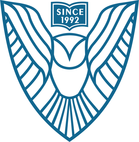 ლოგო2